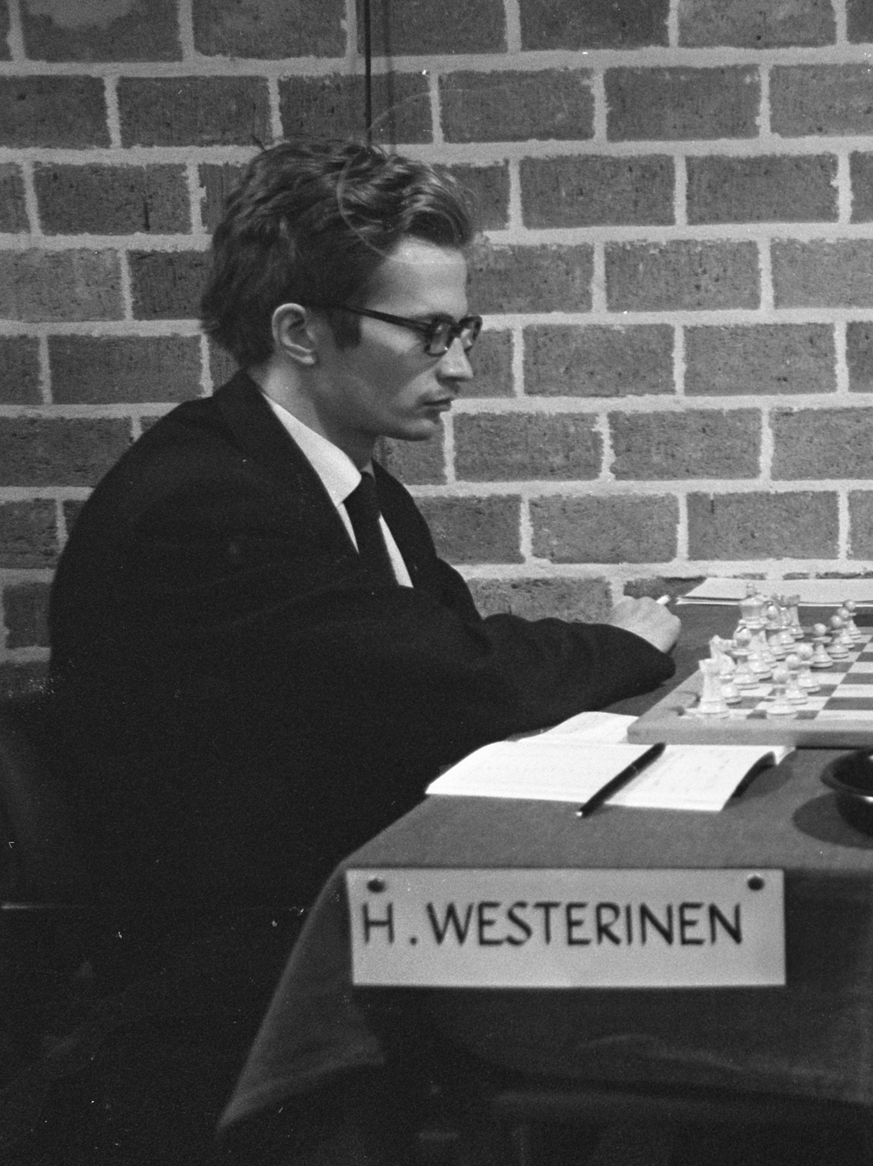 Hoogovens Schaaktoernooi 1970. Westerinen.